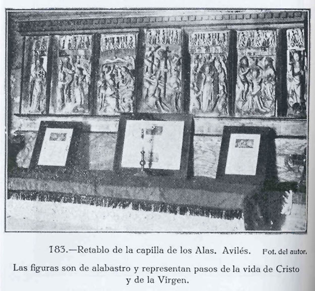 Retablo